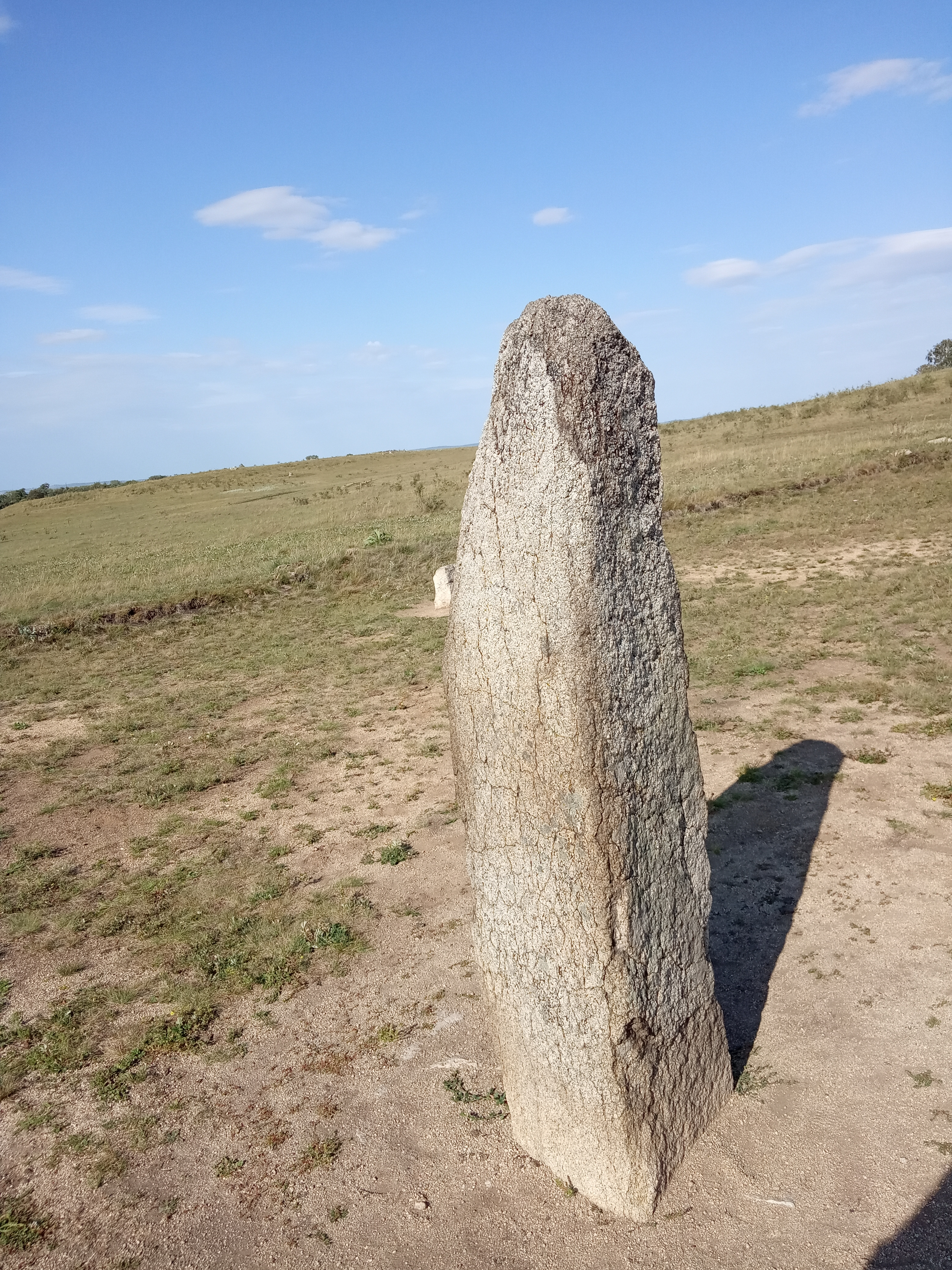 Башҡортса: Учалы районы Ахун ауылы